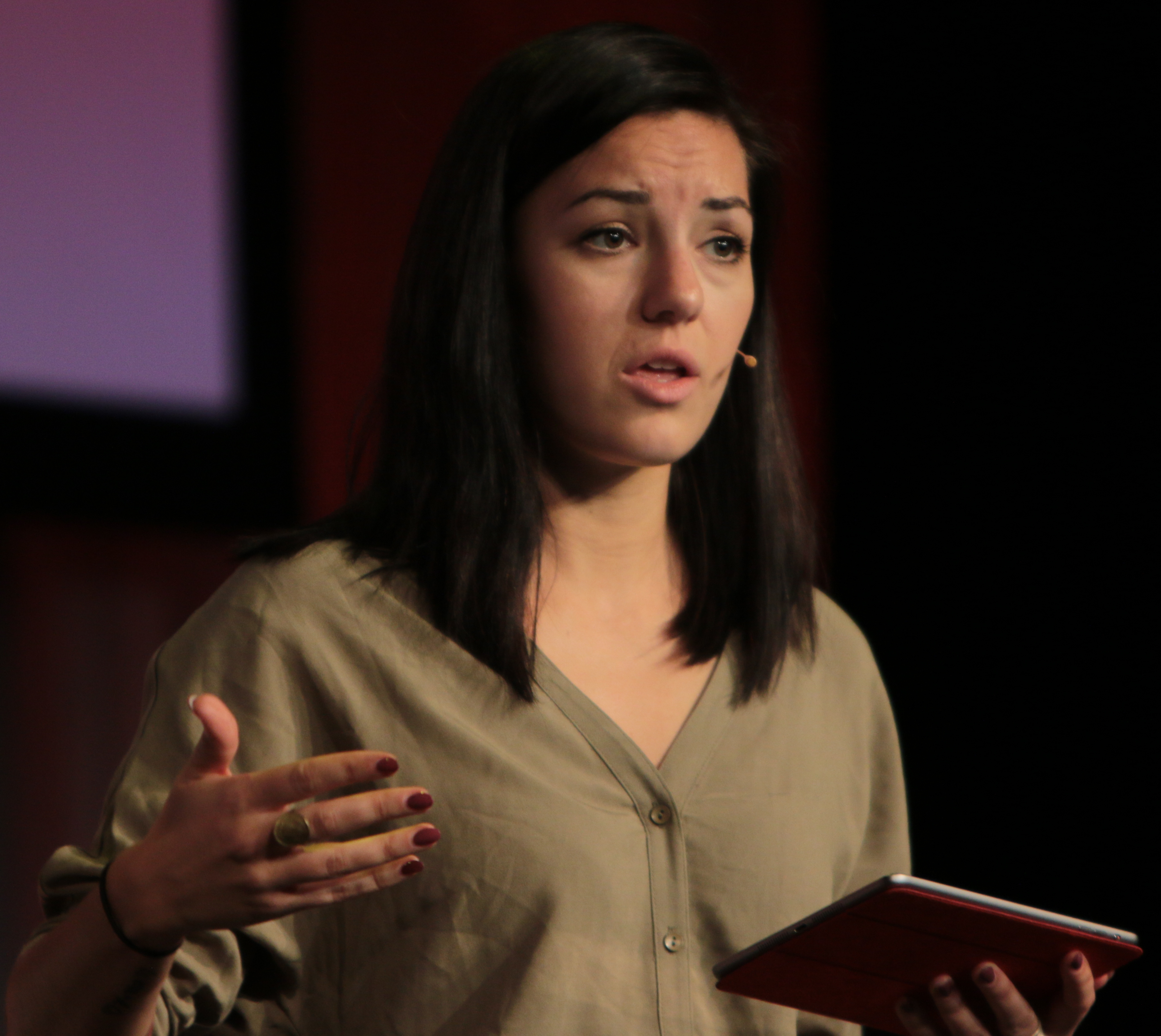 Medvirkende: Annette Groth, Hanne Louise Åkernes